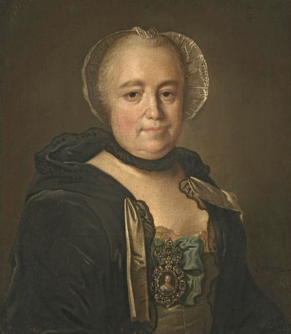 Портрет неизвестной статс-дамы. Возможно портрет Елены Александровны Нарышкиной, урож. Апраксиной (1708—1767).